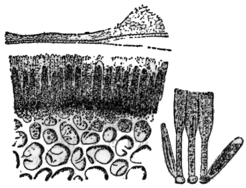 Saccharina latissima